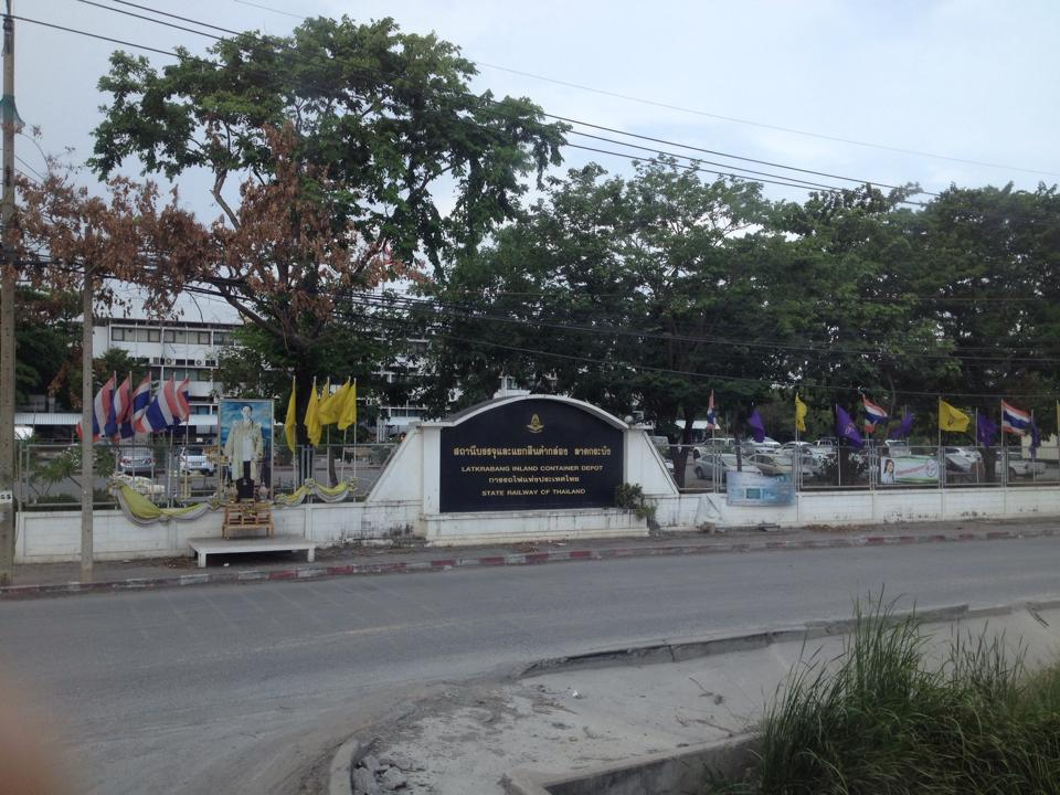 สถานีบรรจุและแยกสินค้ากล่อง ลาดกระบัง (Inland Container Depot : ICD)